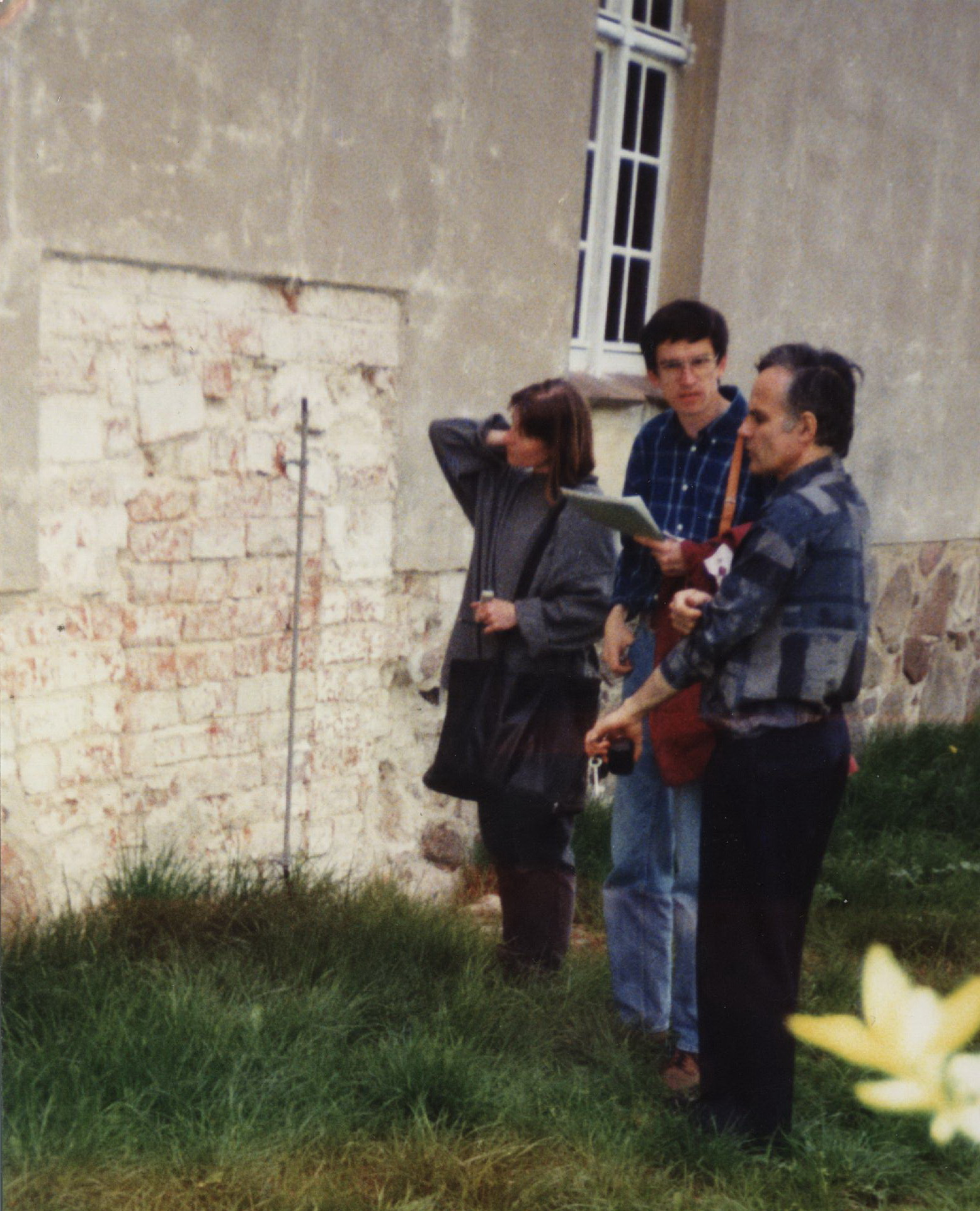 Das Foto zeigt die Nordwand der Dorfkirche Staaken mit zwei vom Putz befreiten Stellen von Ziegel- und Feldsteinmauerkwerk: zum einen die mit Backsteinziegeln zugesetzte Tür der ehemaligen Sakristei, zum anderen den Sockel aus ungequaderten Feldsteinen.